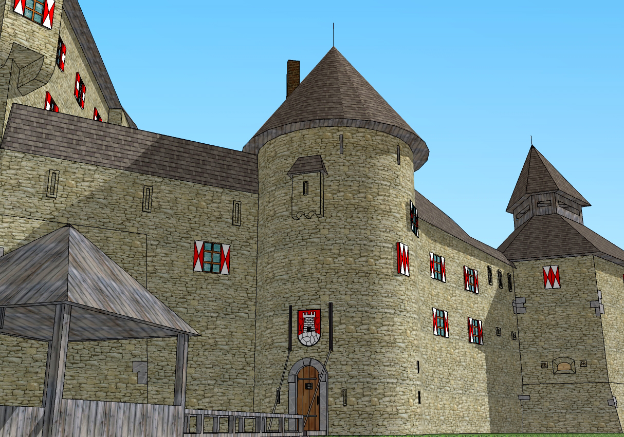 3D rekonstrukcija Starega gradu Samobor s programom SketchUp